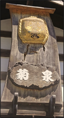 復元された立体看板